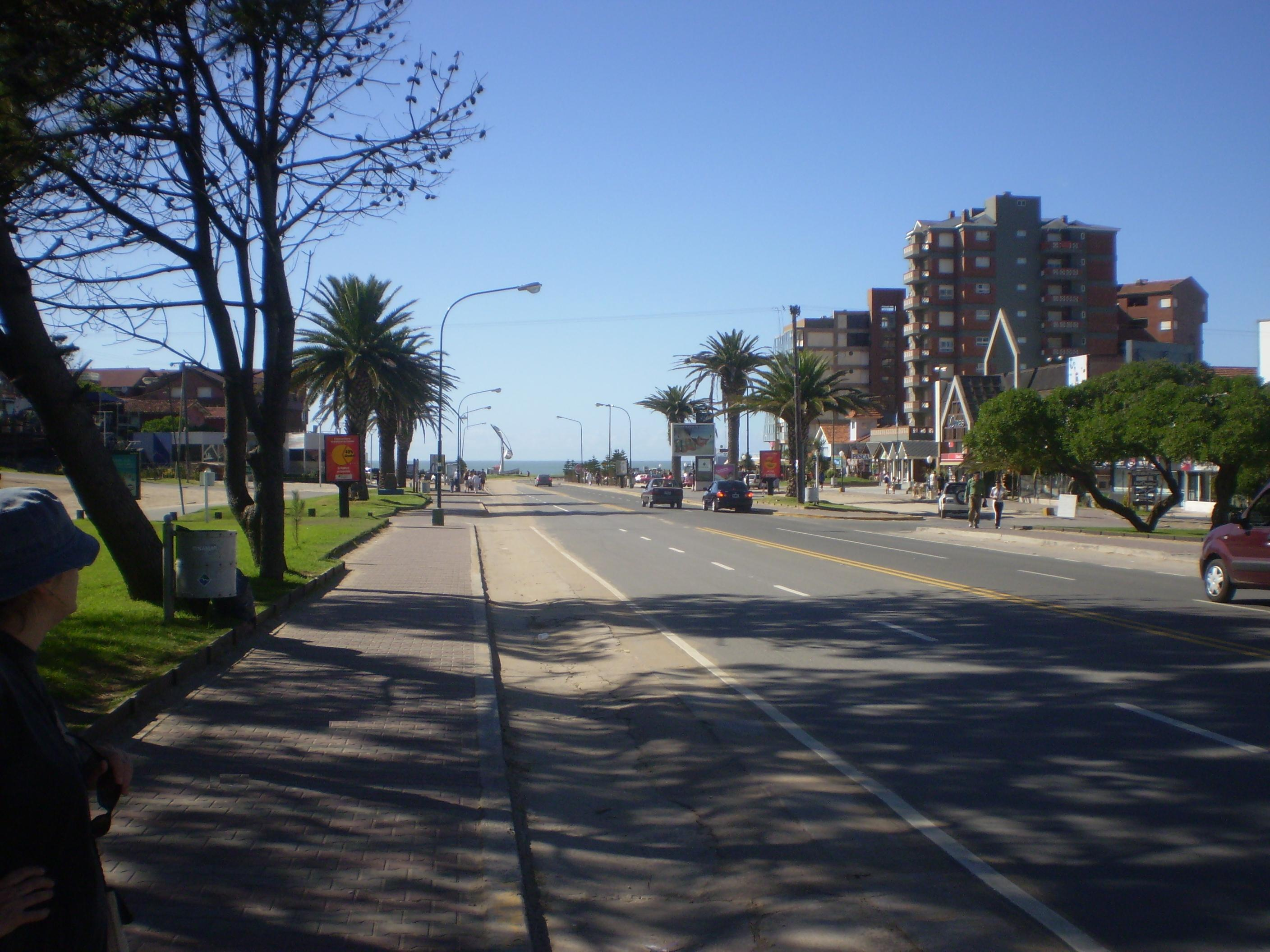 Avenida Bunge. Pinamar, Argentina.